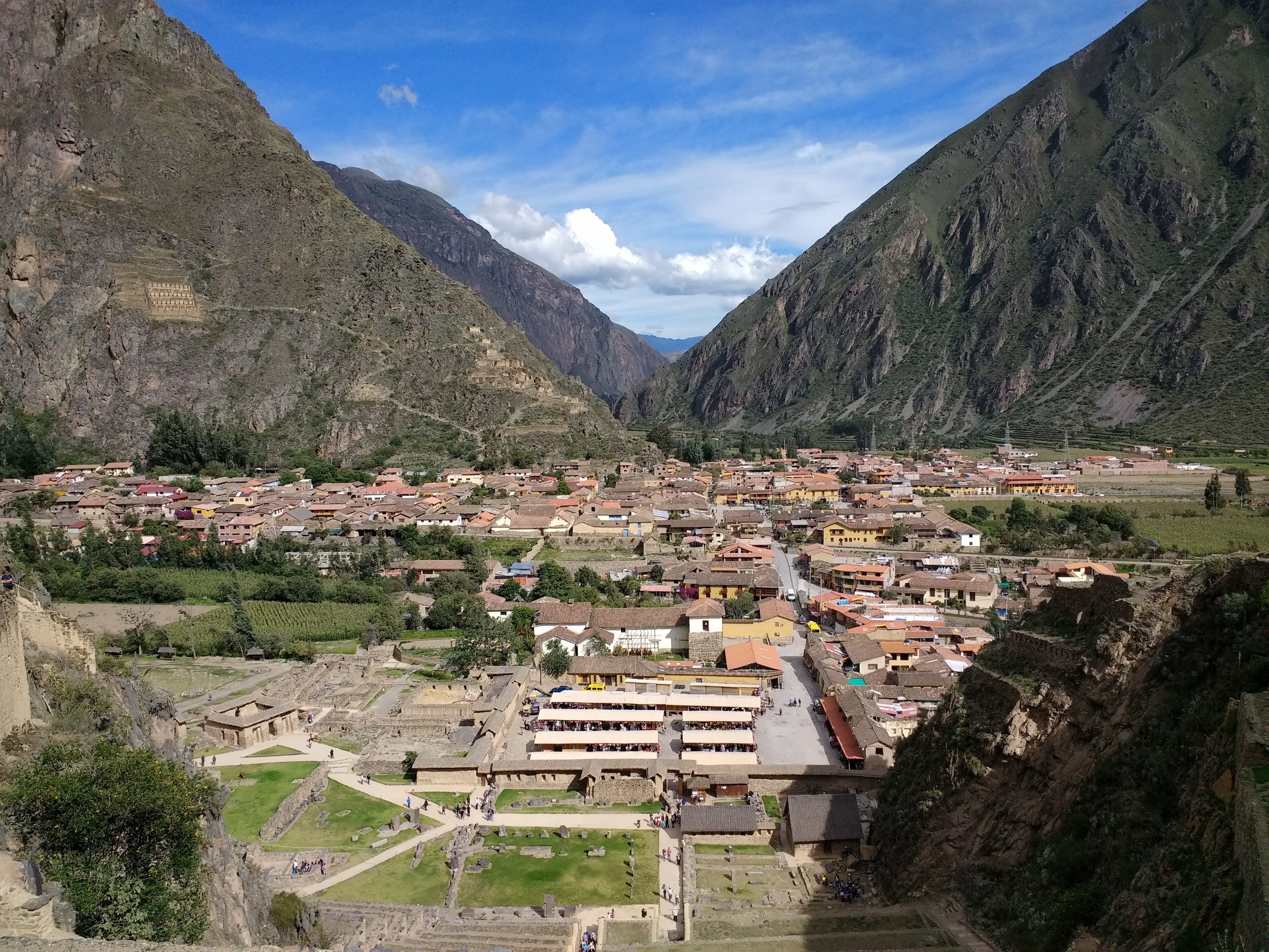 Ollantaytambo, Peru.